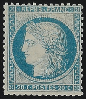 stamps France 1870 / Timbre de France Cérès du siège de Paris / IIIe république